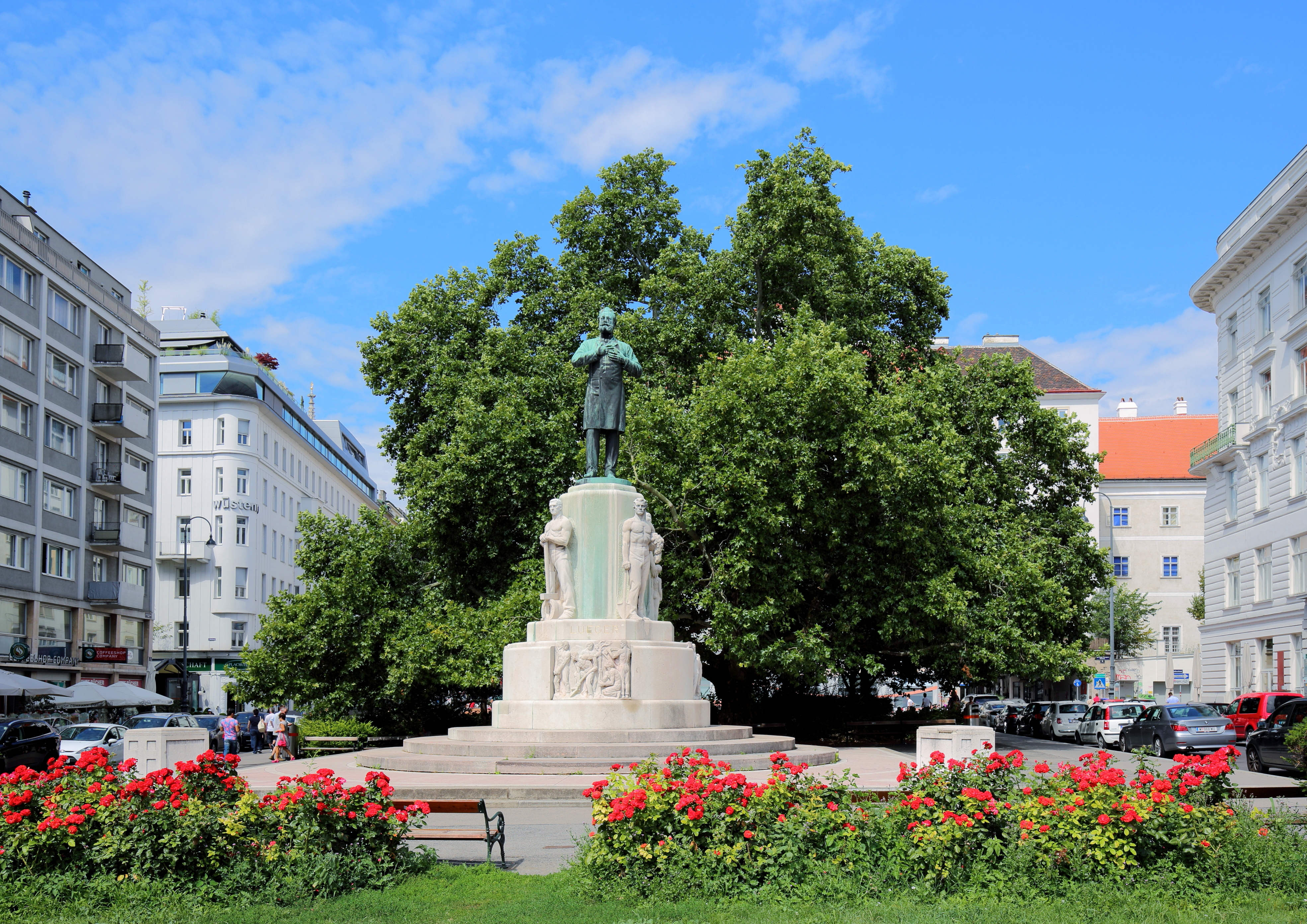 Das Karl-Lueger-Denkmal am Dr.-Karl-Lueger-Platz in der österreichischen Bundeshauptstadt Wien. Das Denkmal für den Wiener Bürgermeister Karl Lueger wurde 1913 vom Bildhauer Josef Müllner im Modell geschaffen. Ursprünglich sollte das Denkmal auf dem Rathausplatz aufgestellt werden und wurde 1926 am jetzigen Standort errichtet.